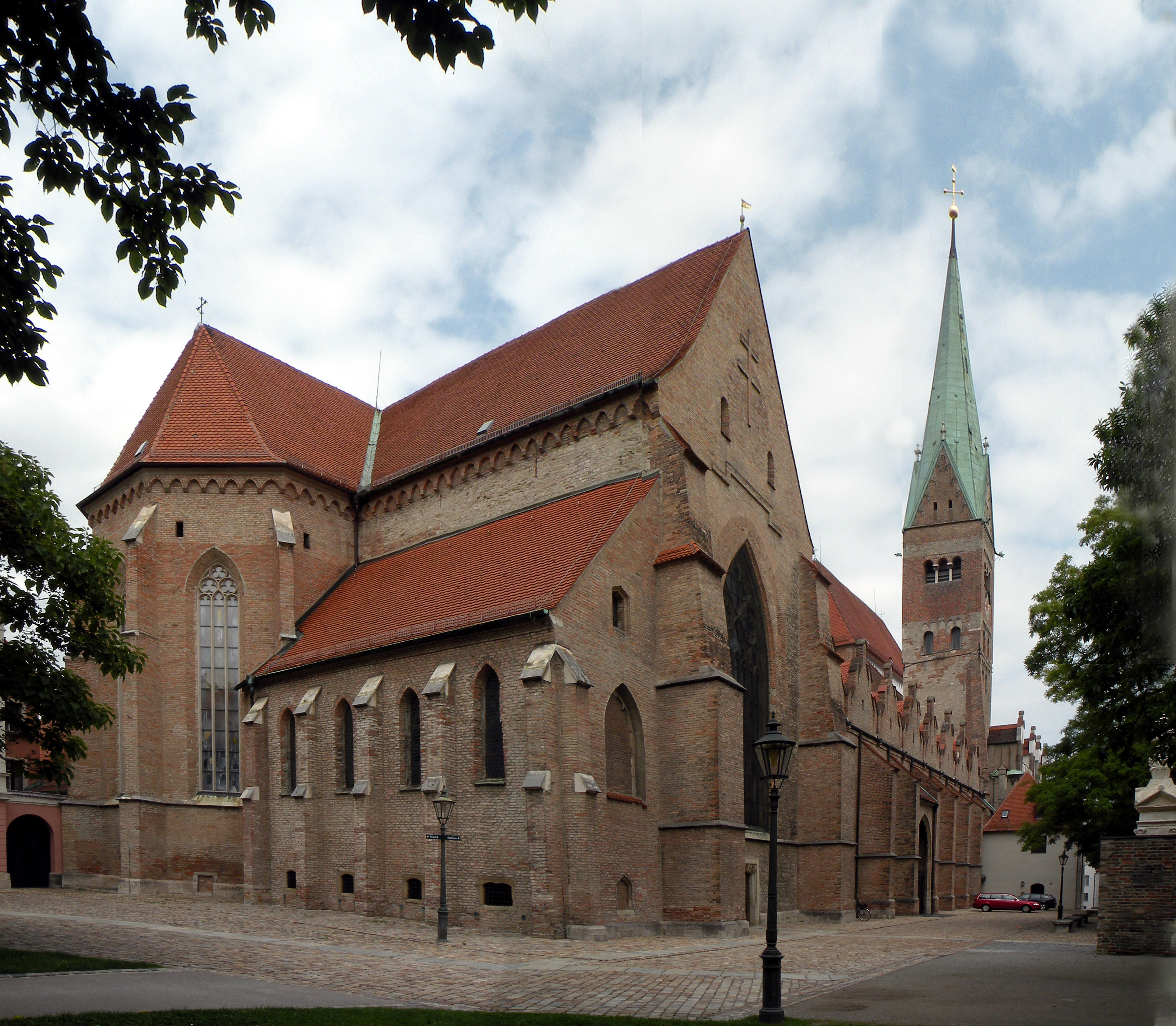 Dom zu Augsburg